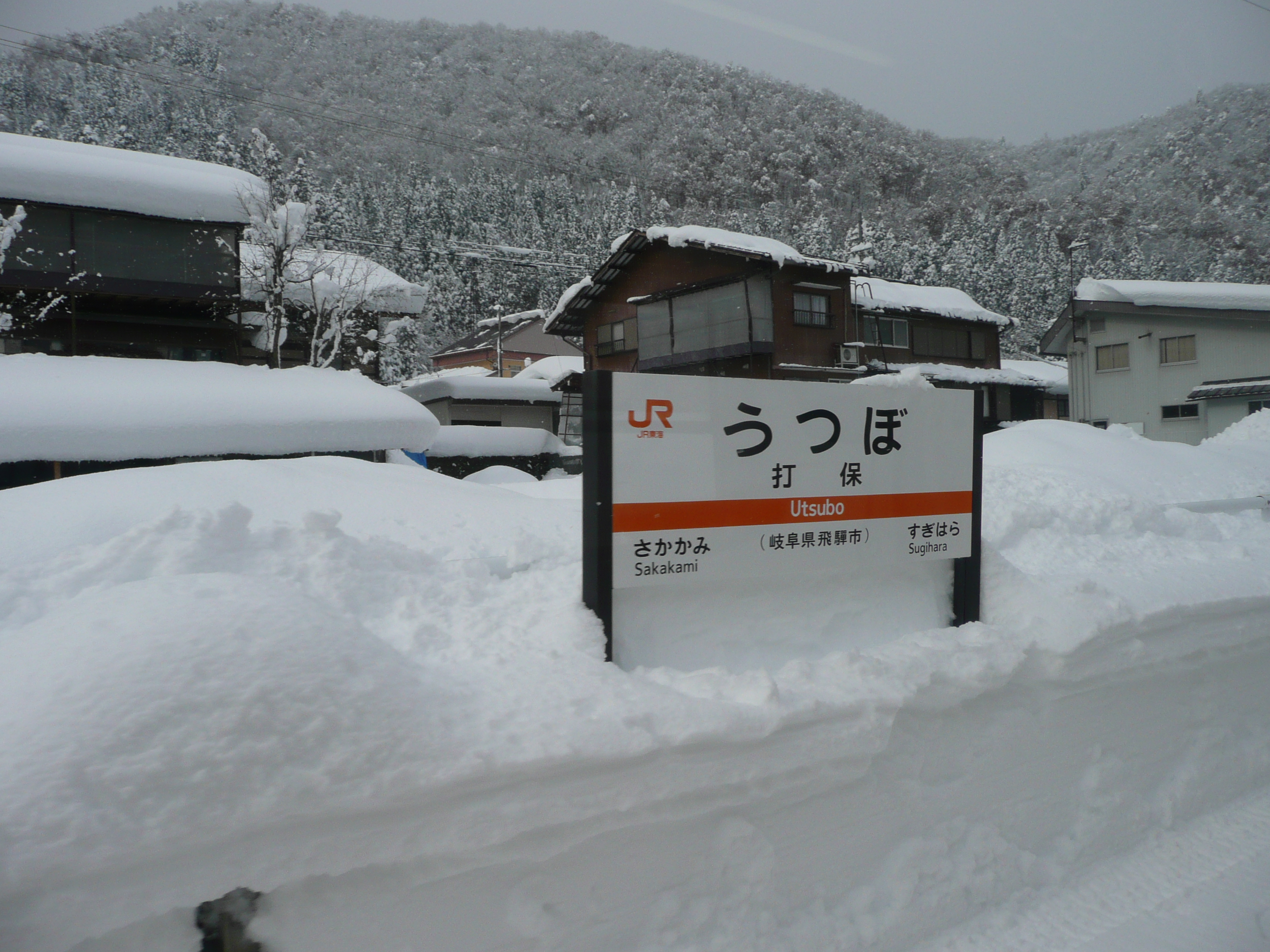 高山本線打保駅の看板。